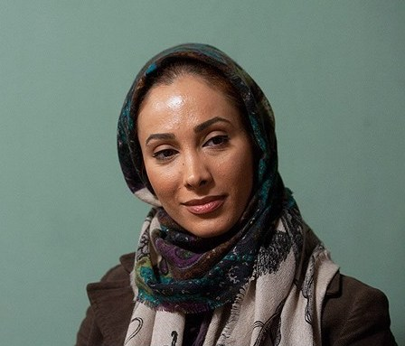 سحر زکریا در نشست خبری مجموعه تلویزیونی میلیاردر